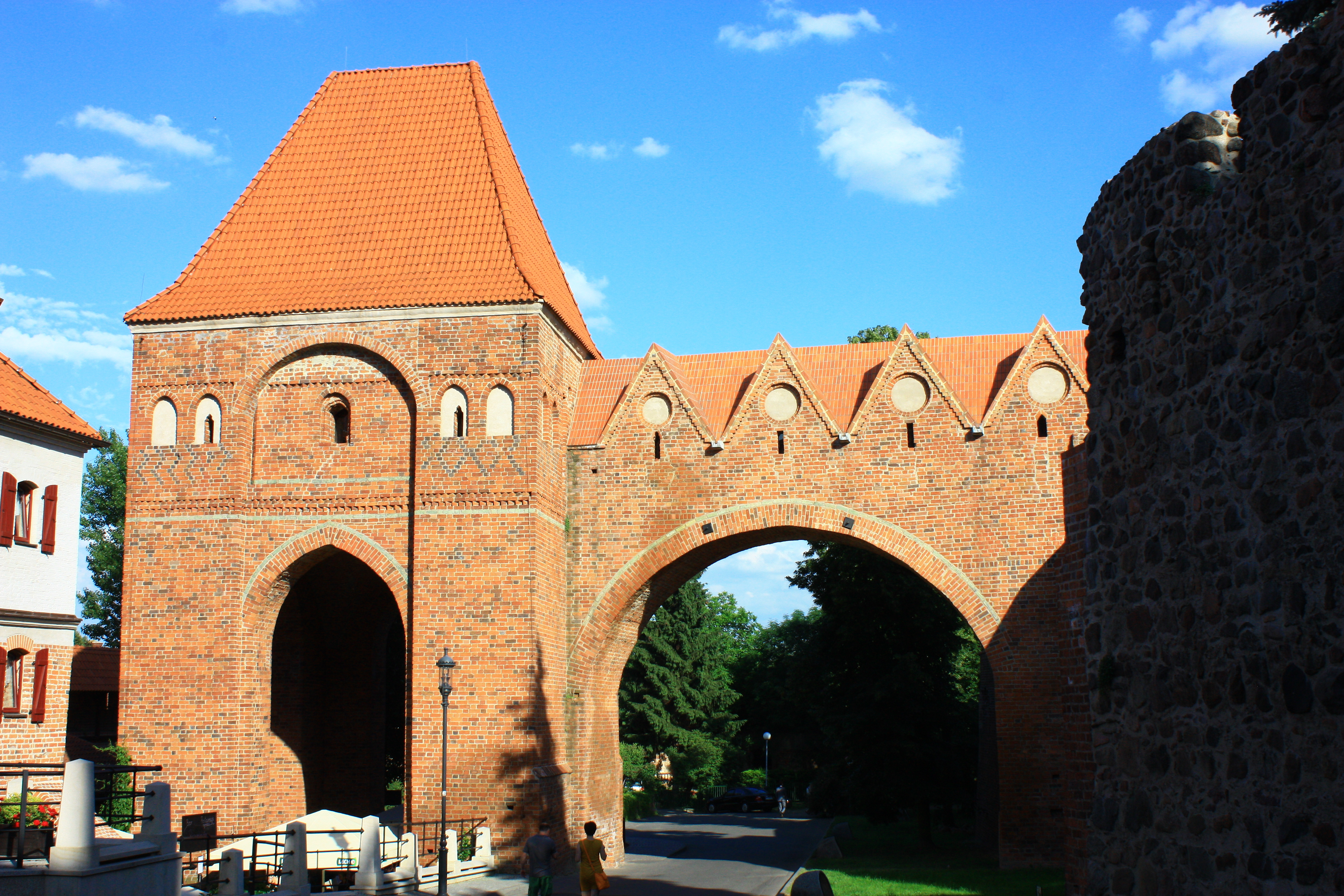 Toruń, gdanisko „Dansker” (wieża ustępowa z gankiem), kon. XIII